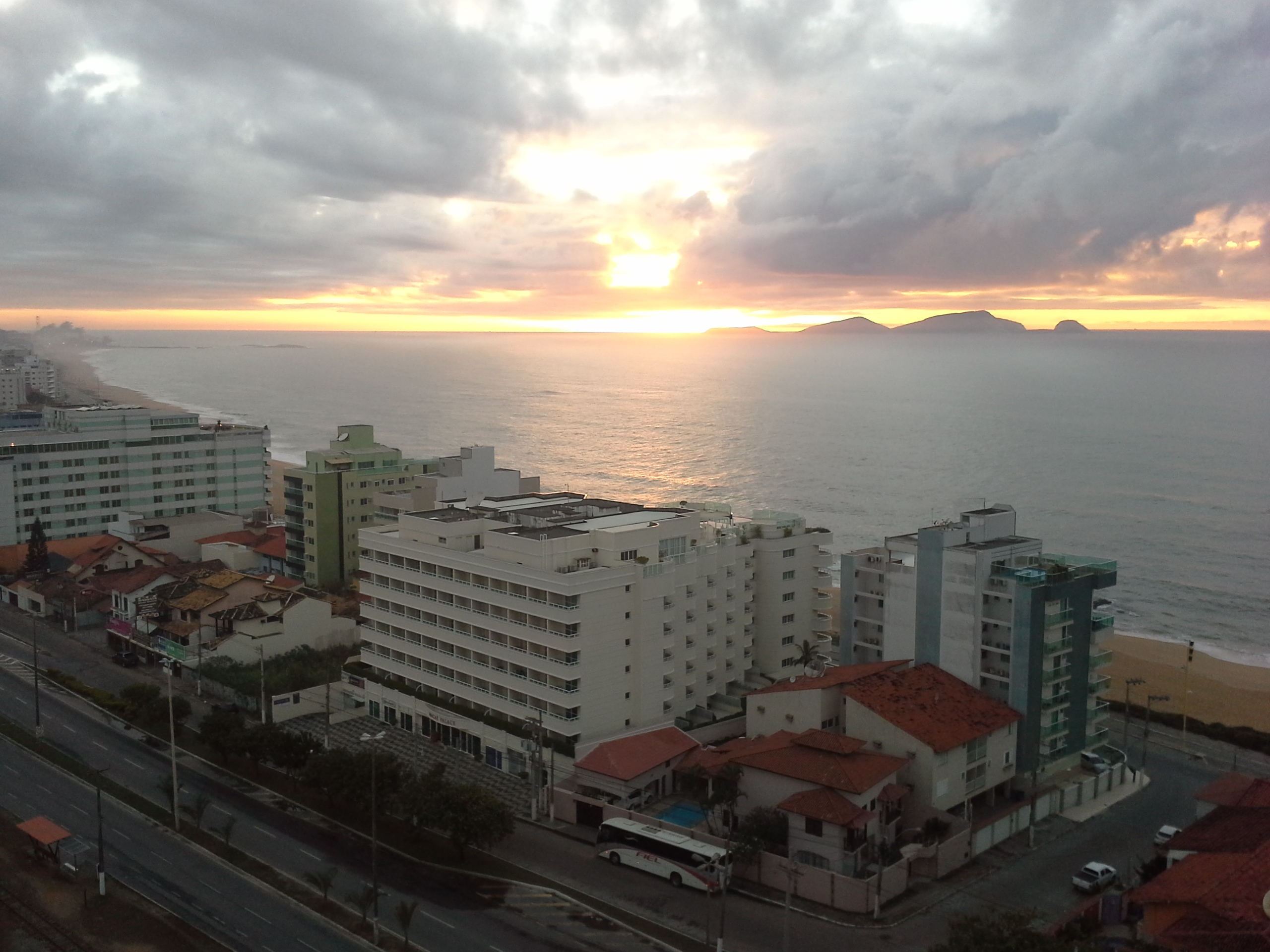 sunrise